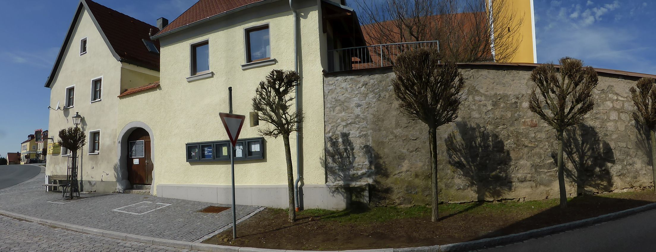 Altenstadt bei Vohenstrauß (Kirchenensemble)